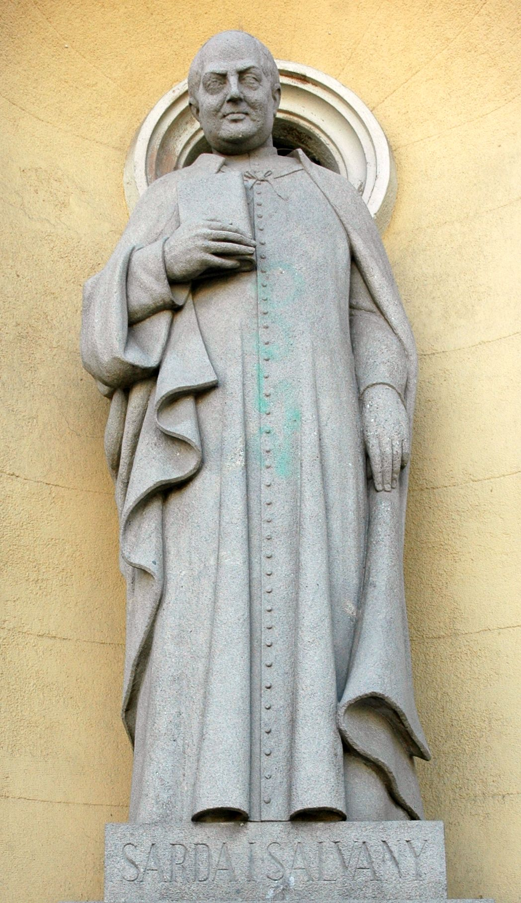 Feliu Sardà i Salvany a l'església vella dels escolapis de Sabadell